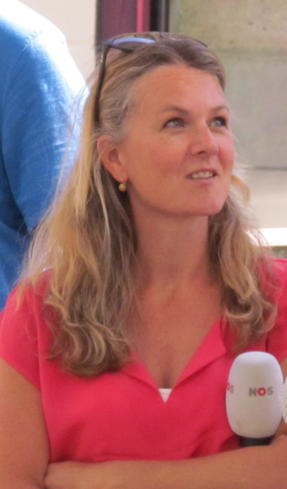 Tanja Braun, verslaggeefster voor het NOS Journaal